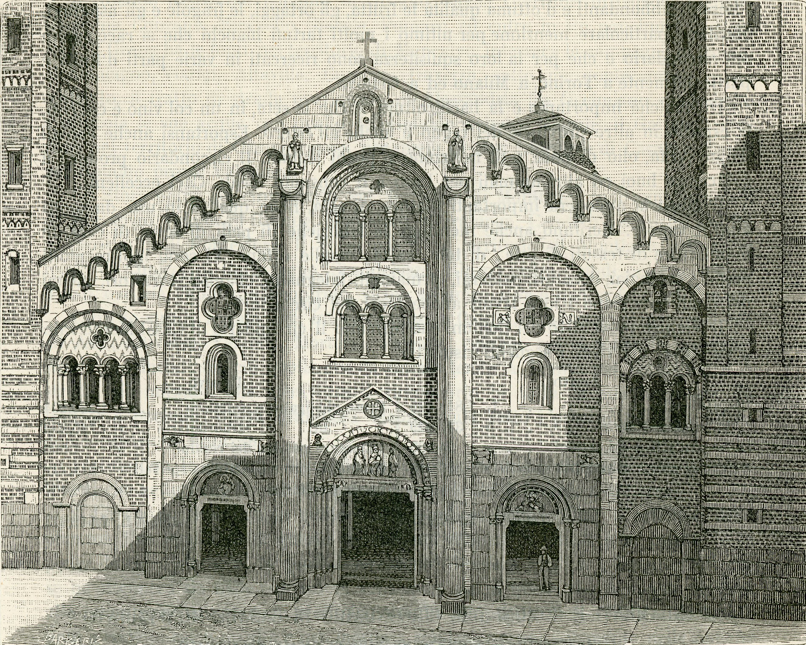 Cattedrale di Casale Monferrato (xilografia).